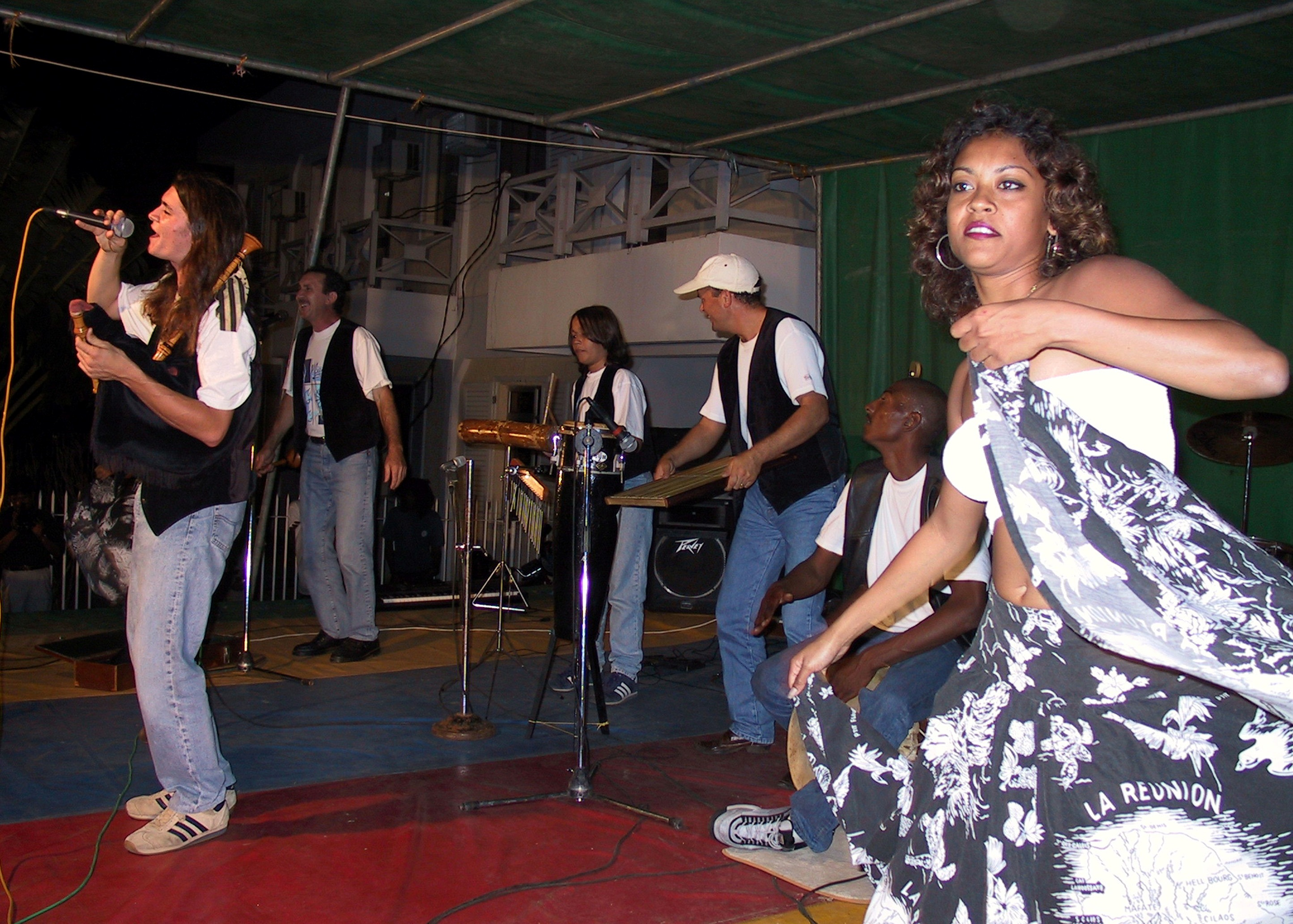 Renésens en concert à l'île Rodrigues en août 2001